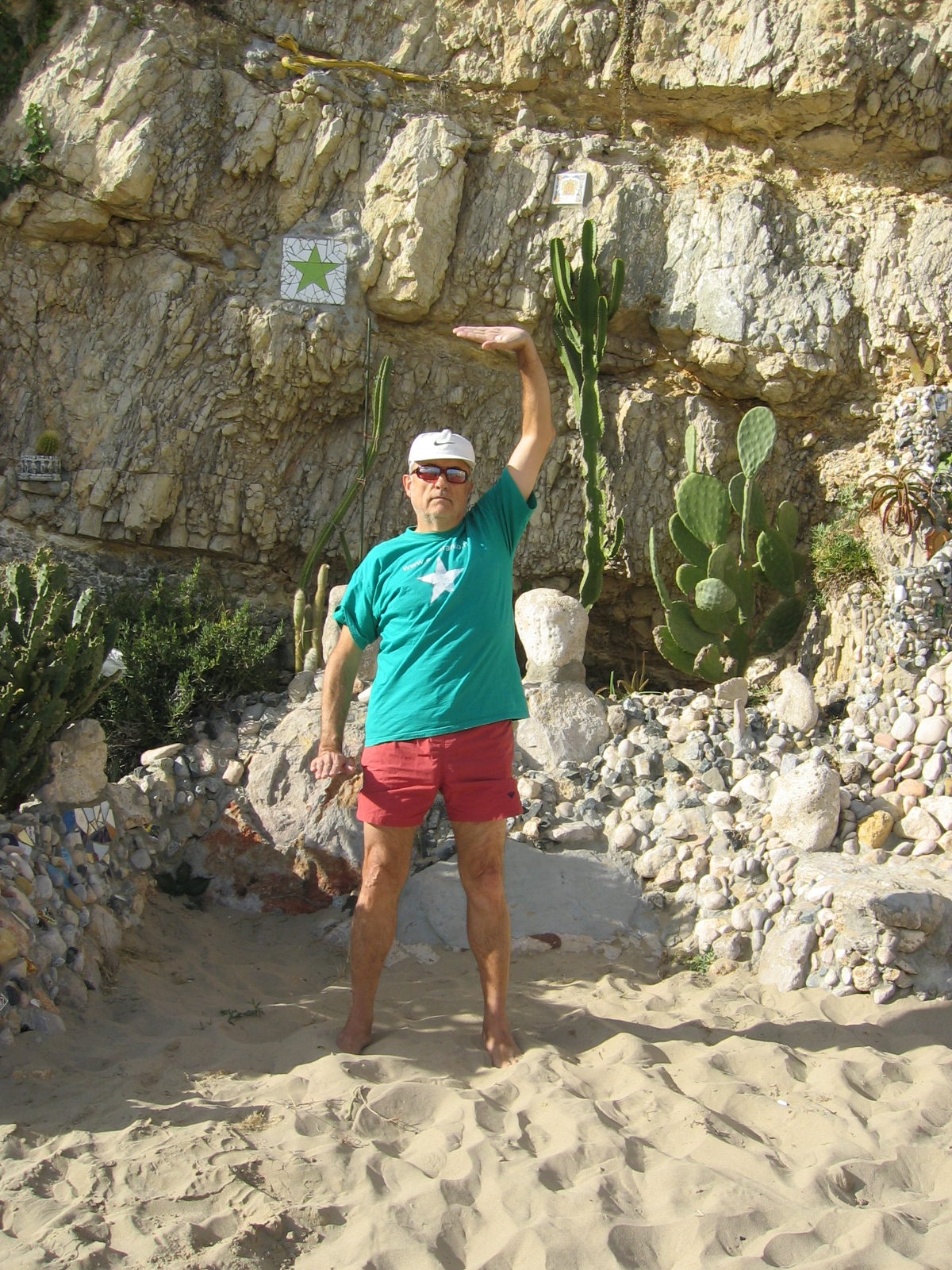 3r moviment de txi kung - Baduanjin foto meva novembre 2006 Joan Inglada Lliure ús